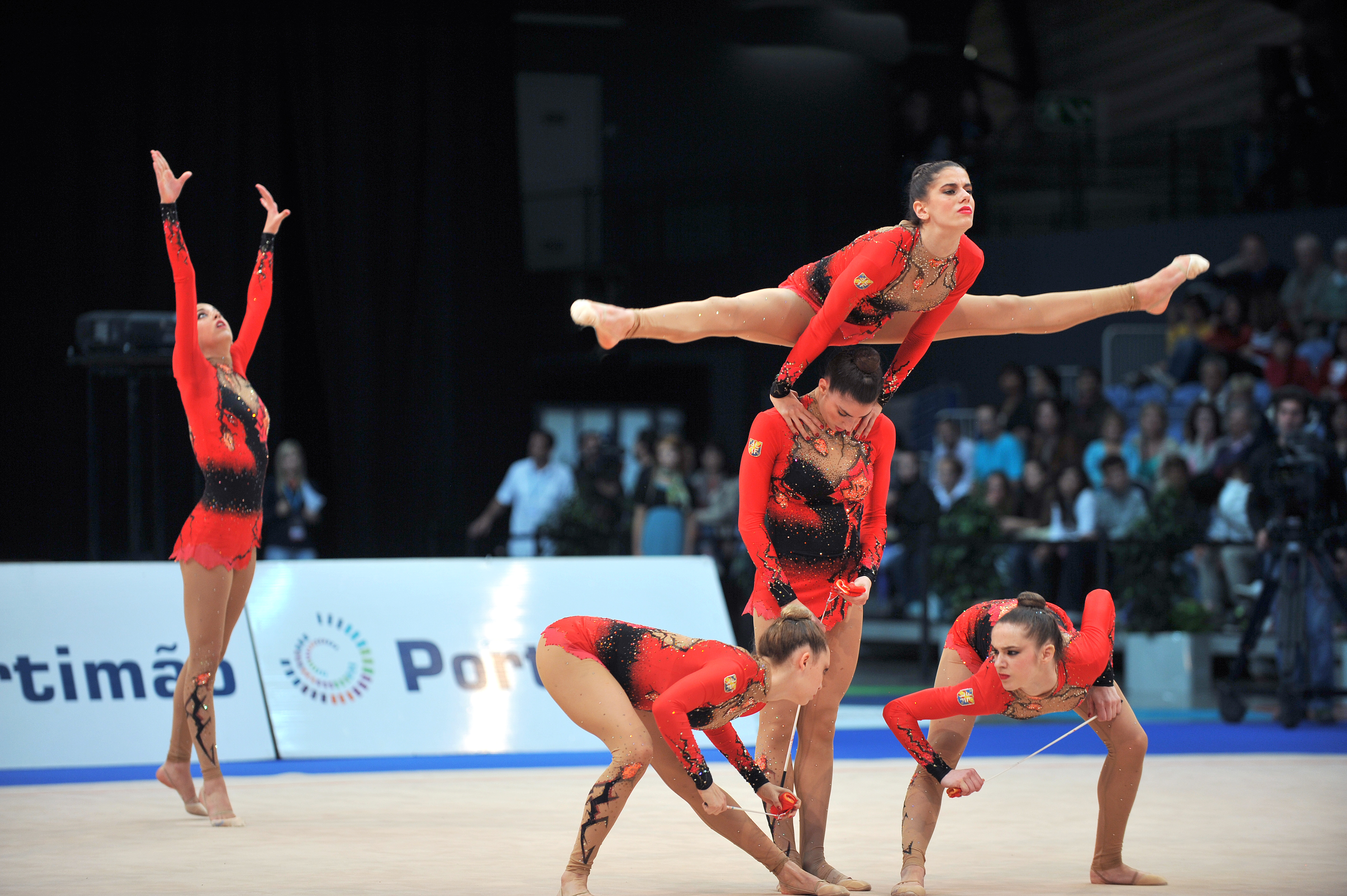 El conjunto español en la Copa del Mundo de Portimao en 2011.